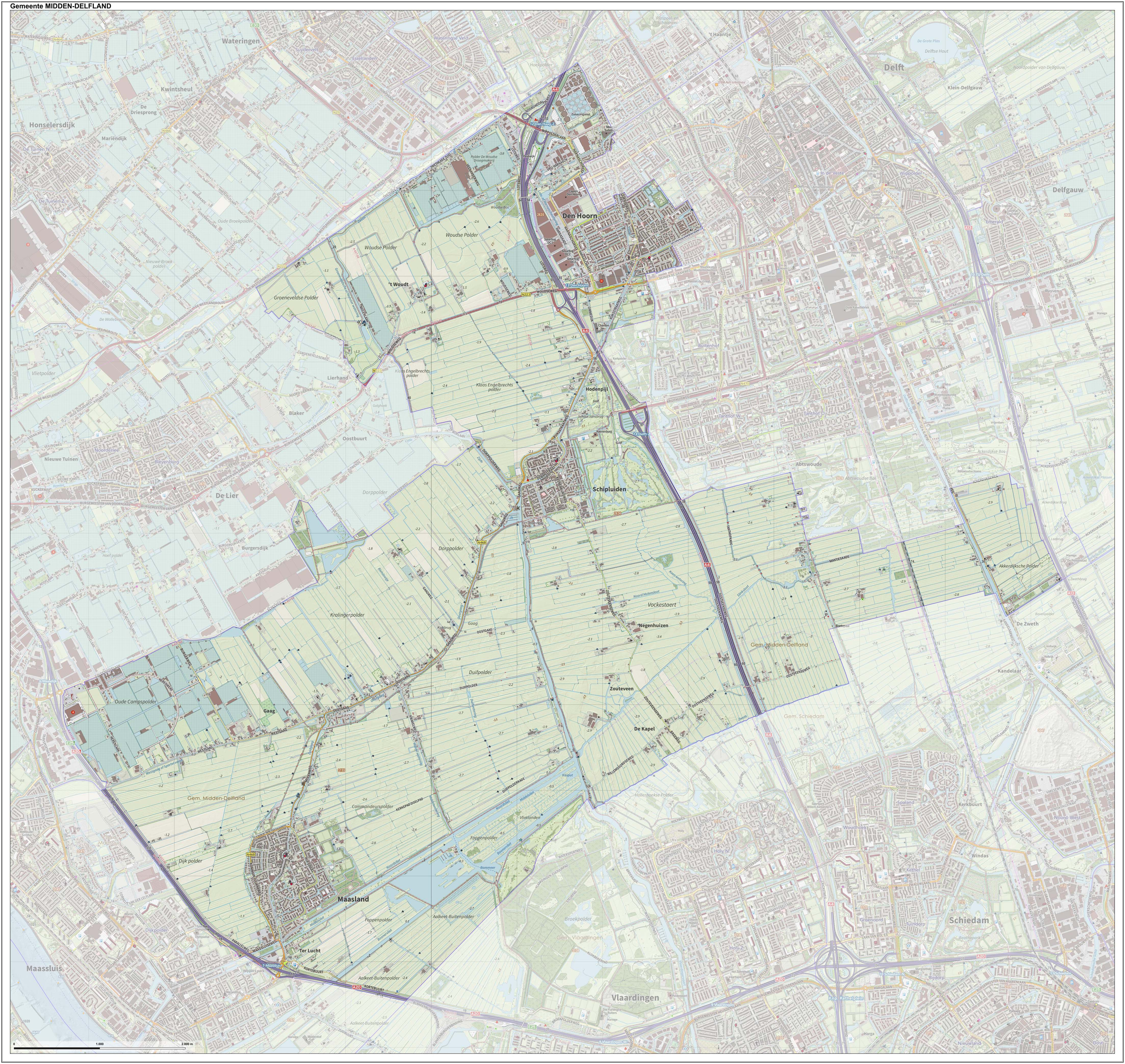 Topografische gemeentekaart. Resolutie: 400 pixels/km. Kaartbeeld samengesteld uit de open geodata van de Top10NL en Top25namen (Kadaster), Creative Commons-BY licentie. Gebouwvlakken uit open geodata BAG extract. Wegen uit de OpenStreetMap, OpenStreetMap community. Reliëfschaduw uit de Actuele Hoogtekaart AHN2. Samenstelling en kleurenschema: Jan-Willem van Aalst, met QGIS. Zie ook de Legenda.